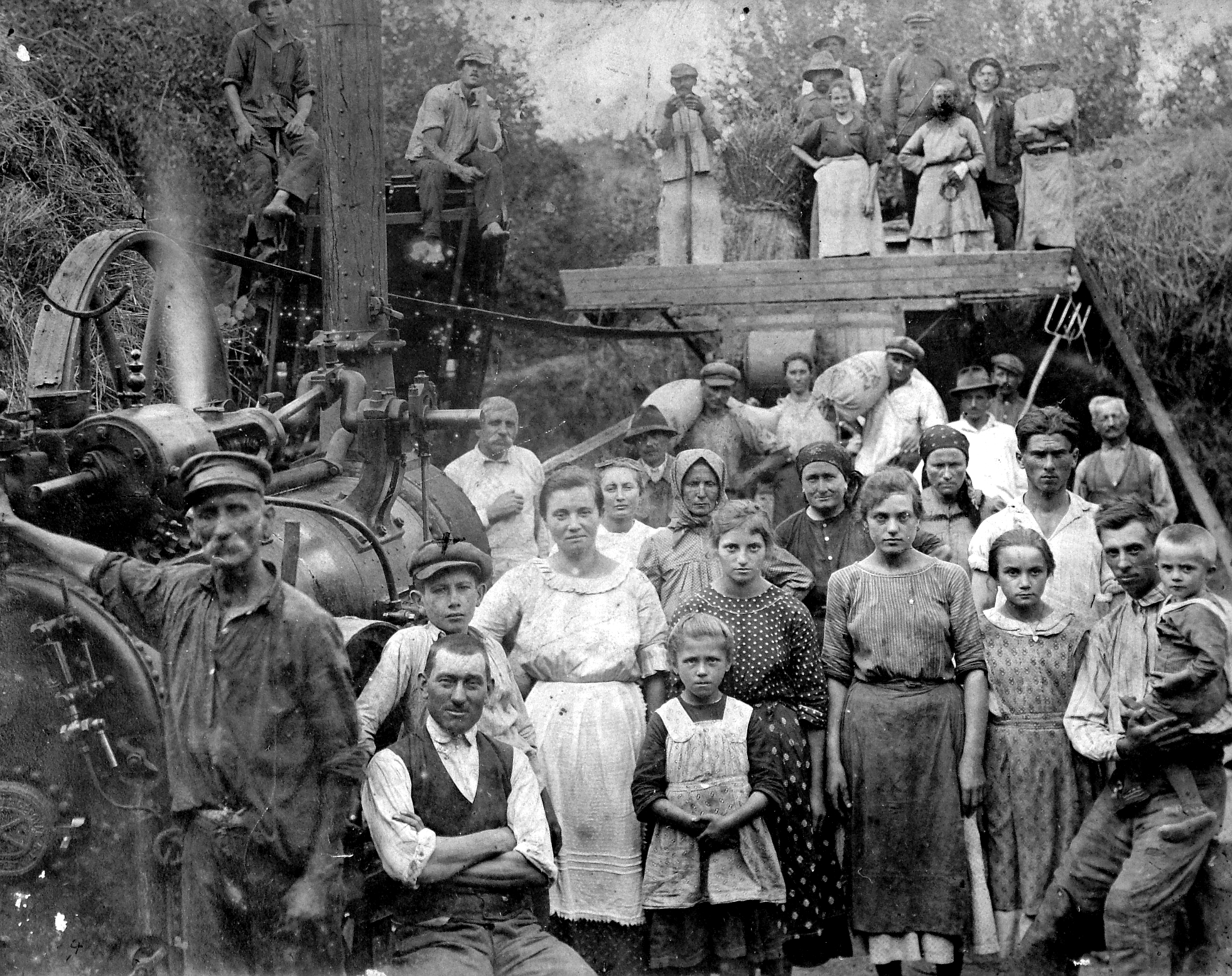 Hofherr-Schrantz-Clayton-Shuttleworth cséplőgép és tüzesgép.